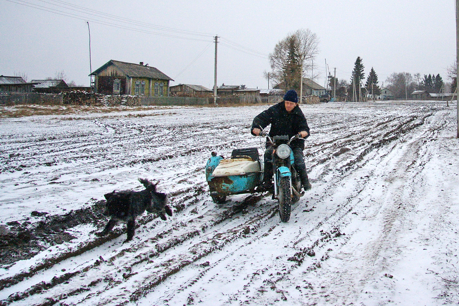 Эстонская деревня Николаевка в Новосибирской области